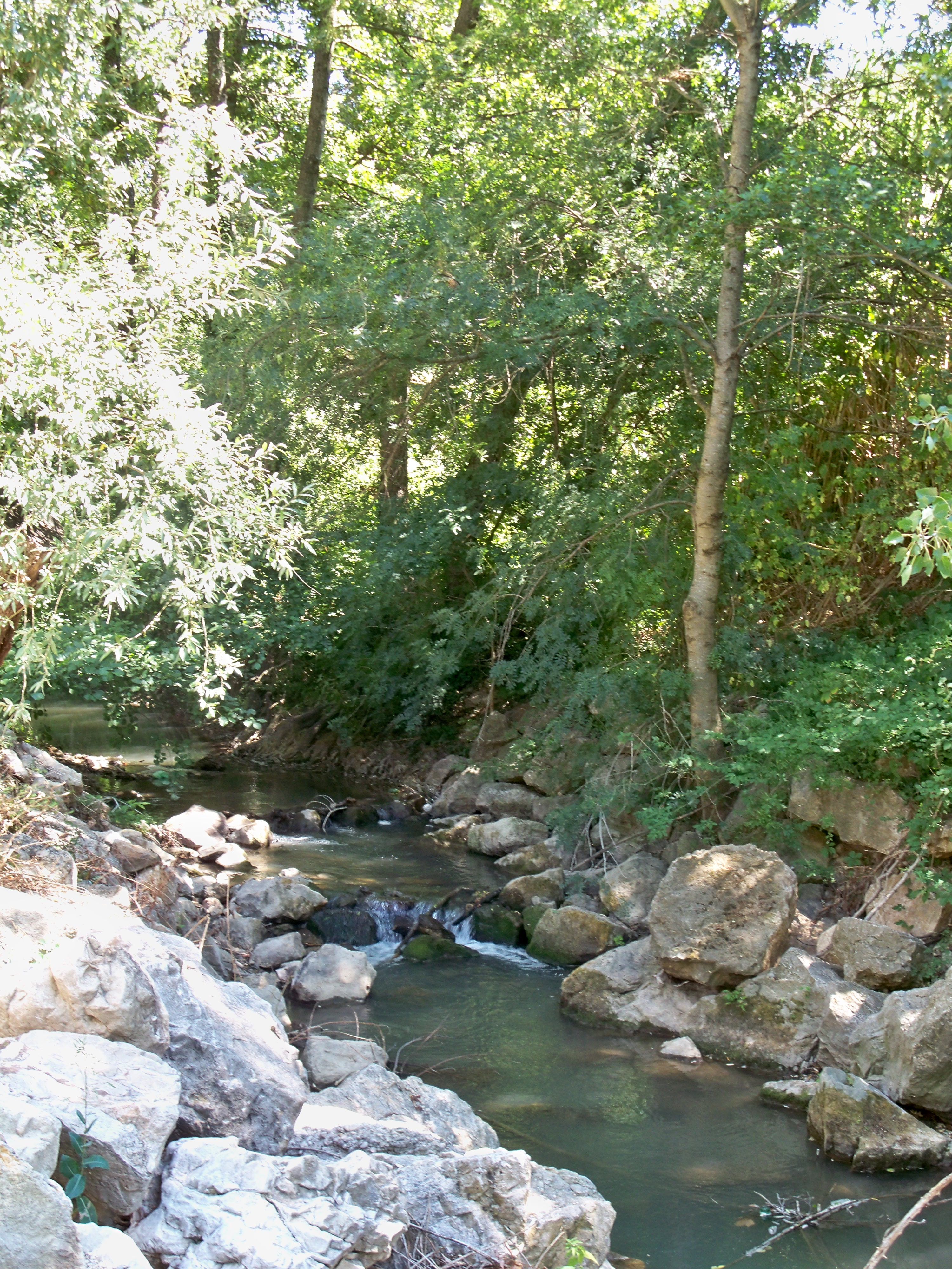 cours d'eau l"Hérin à Bouchet, Drome, France